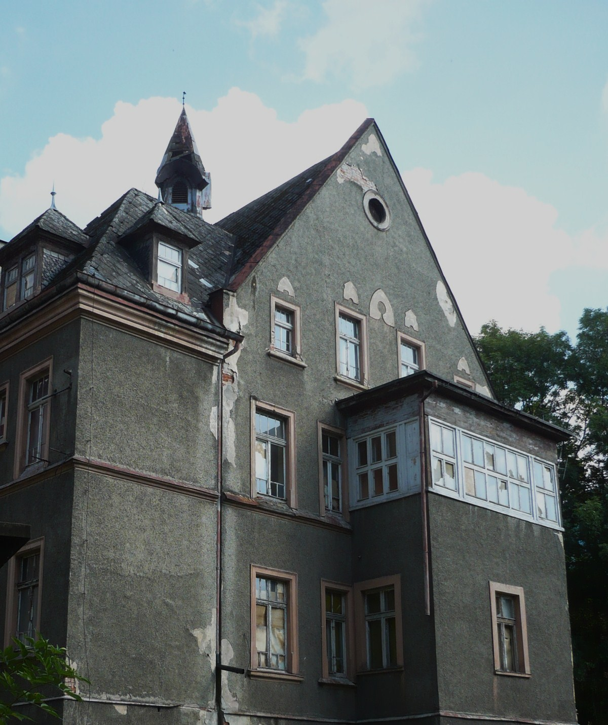 Nowa Ruda. ul. Marszałka Józefa Piłsudskiego 16 - szpital miejski, 1879, 1908, 1912